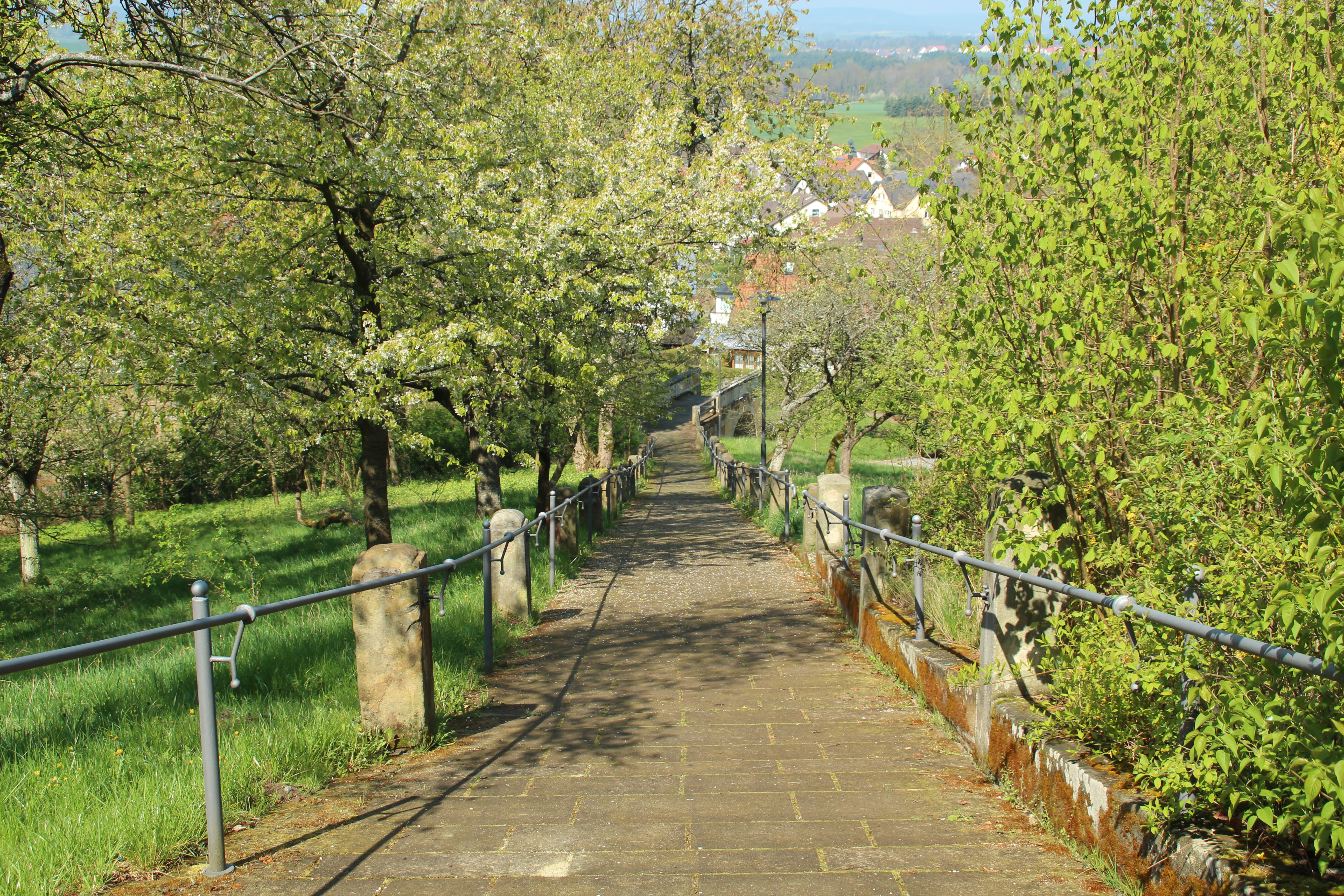 Wallfahrtsweg der Kirchenburg Gesees